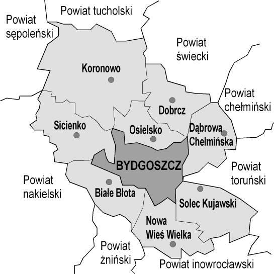 Powiat bydgoski - mapa gmin